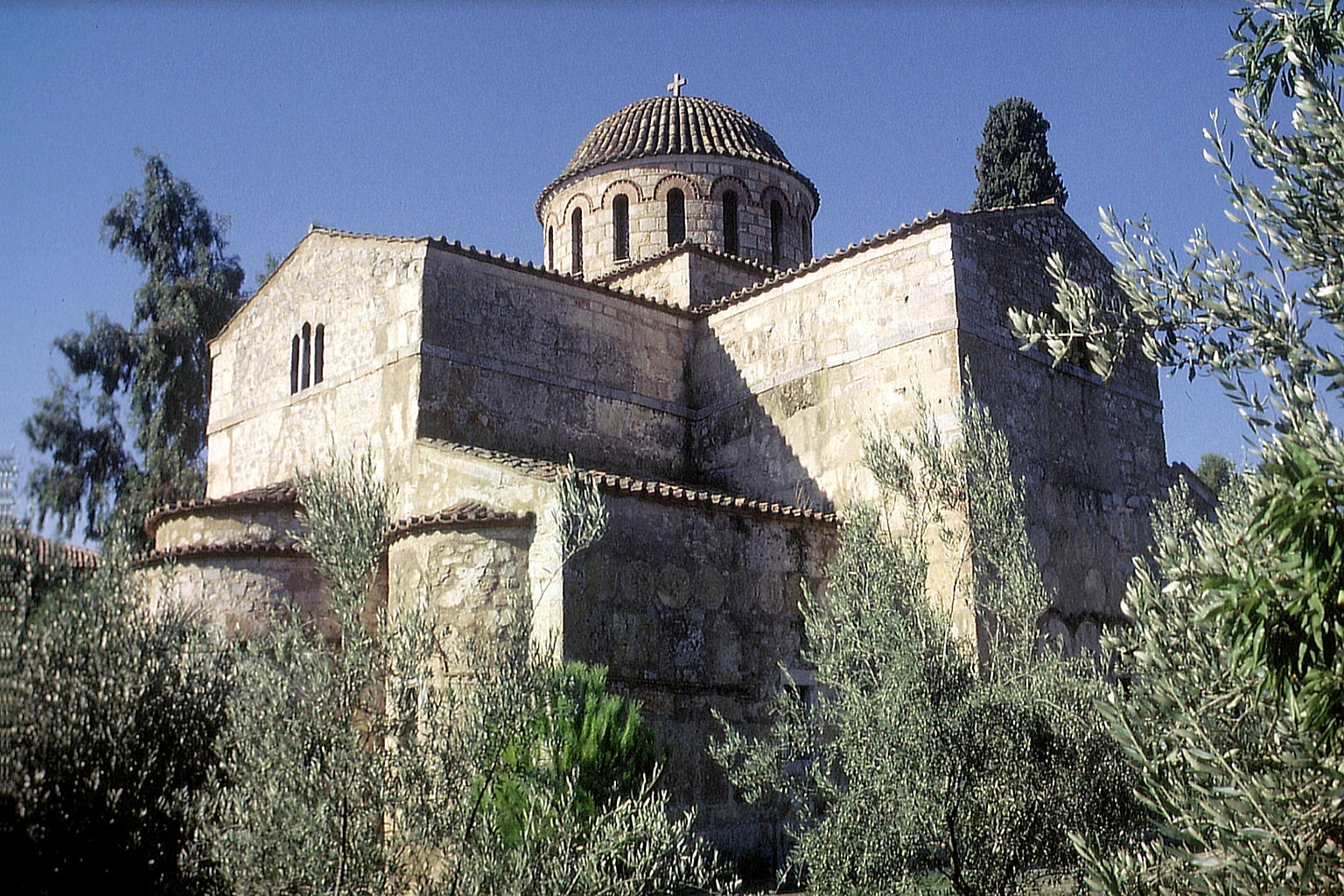 Byzantinische Kirche Panagia Skripou aus dem 8. Jahrhundert